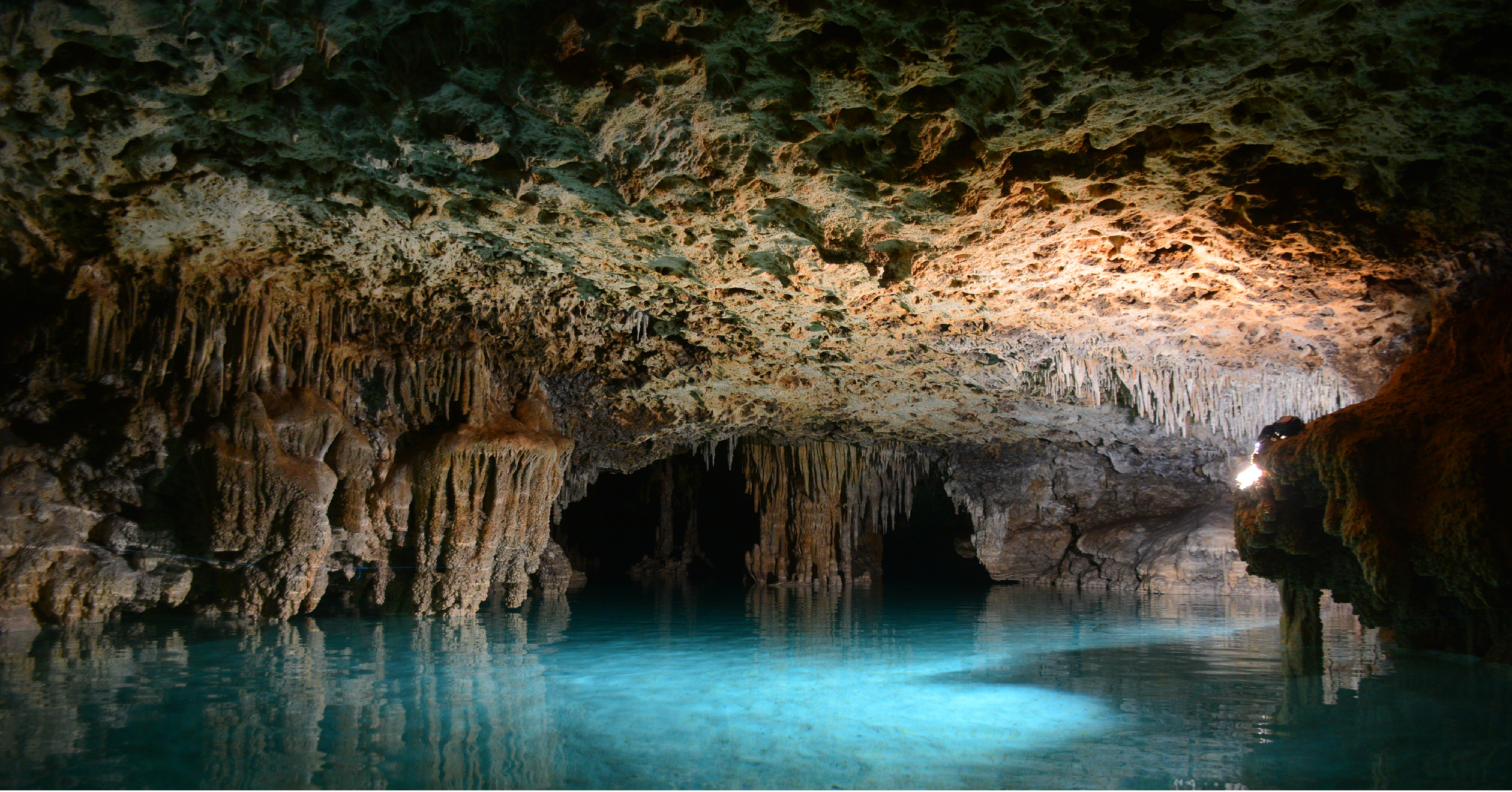 El agua de la cueva es de un color azul brillante y las formaciones espeleológicas que se forman son únicas.